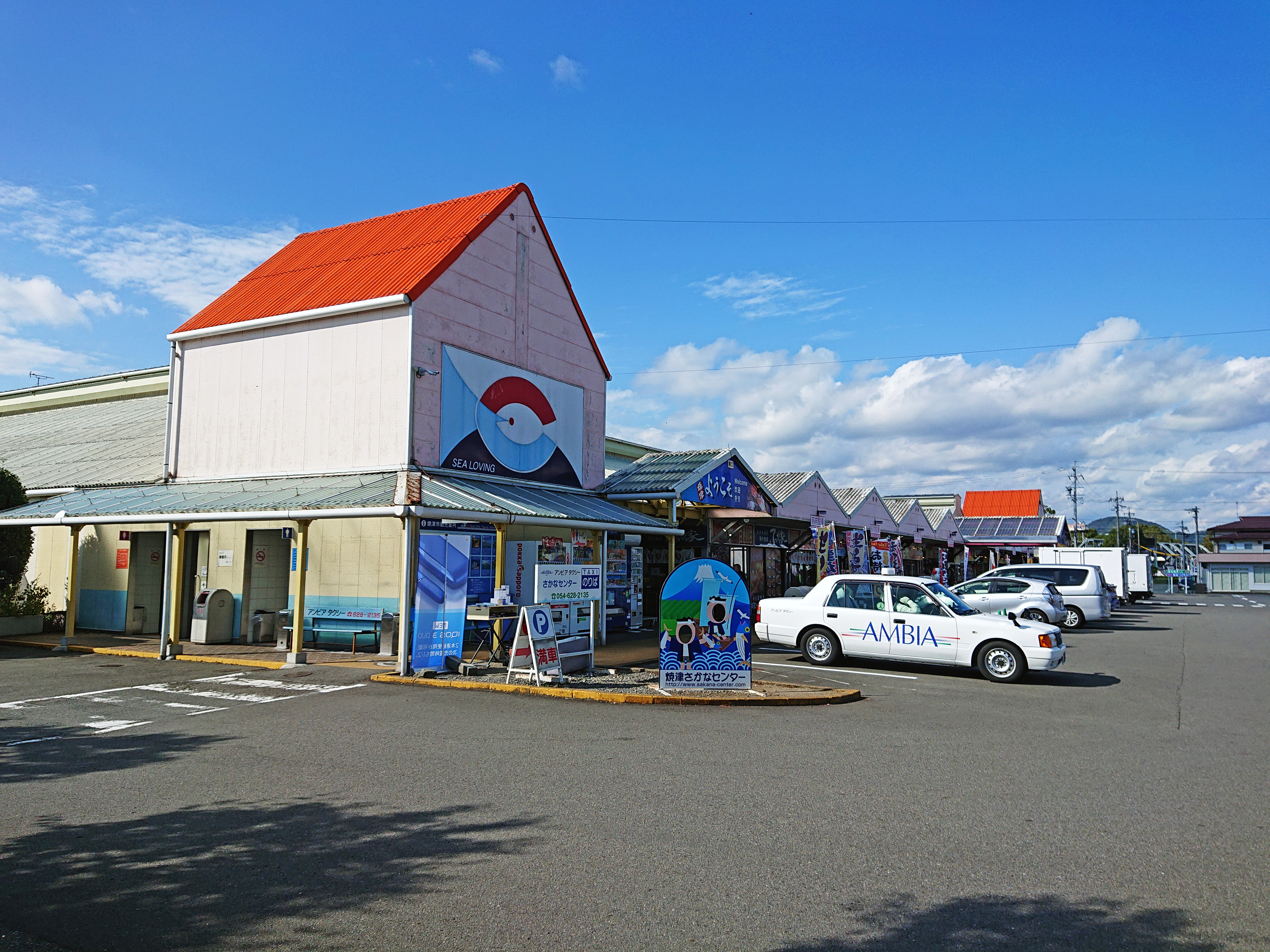 静岡県焼津市「焼津さかなセンター」